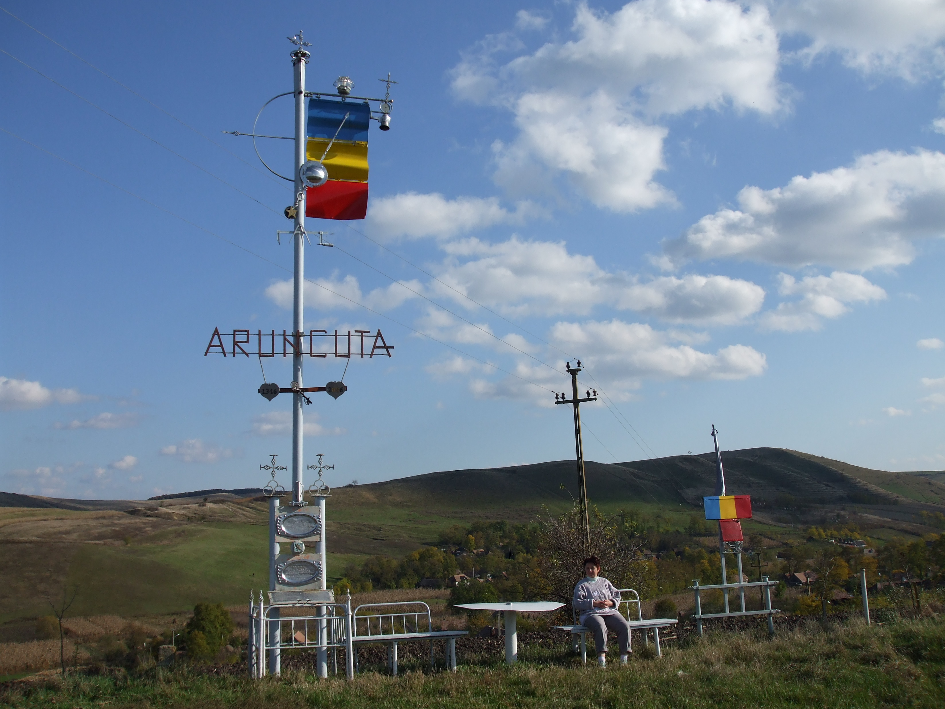 Imagini din Aruncuta,Cluj